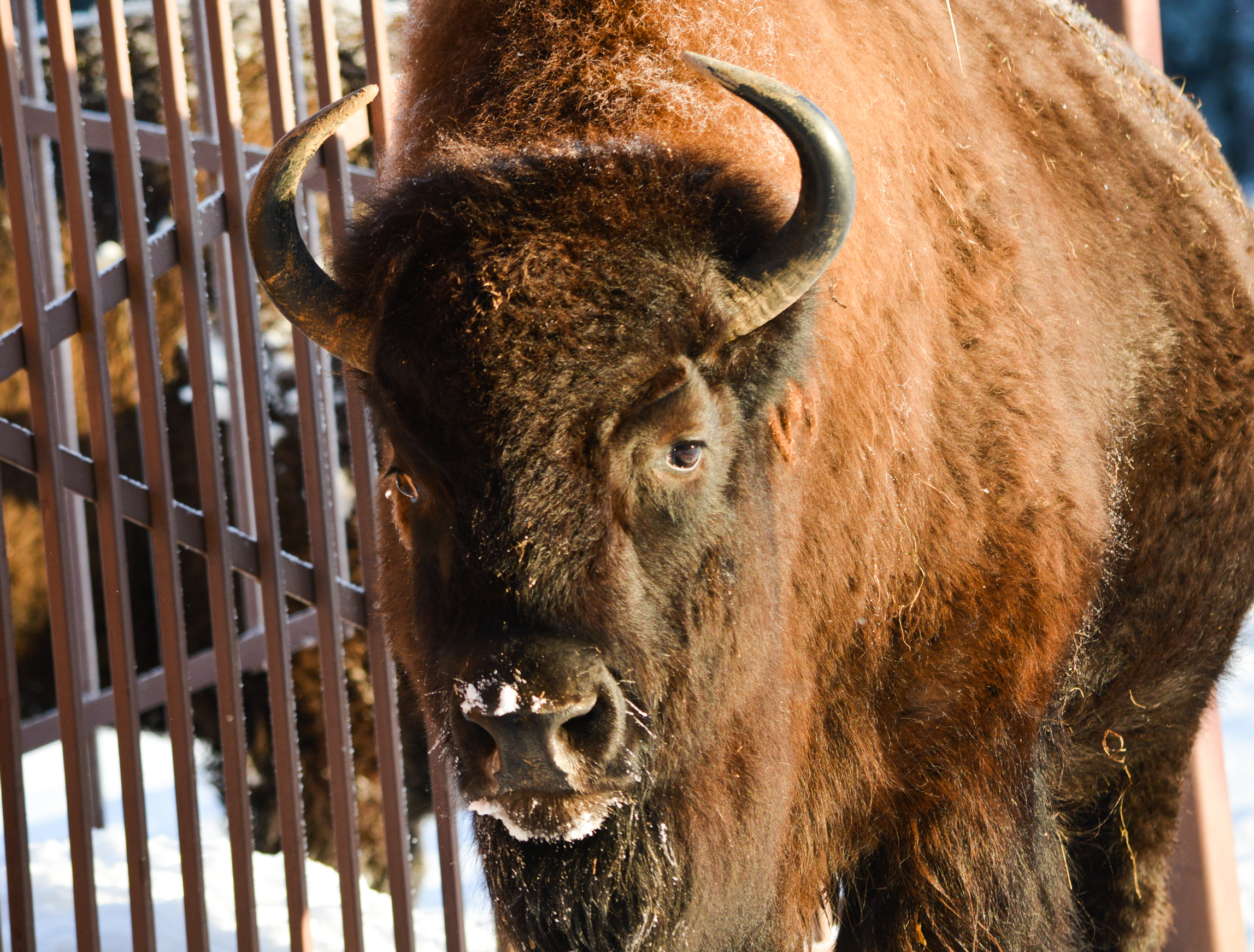 Зубробизон в Ново-Кавголовском лесопарке посёлка Токсово, близ Санкт-Петербурга (Россия)